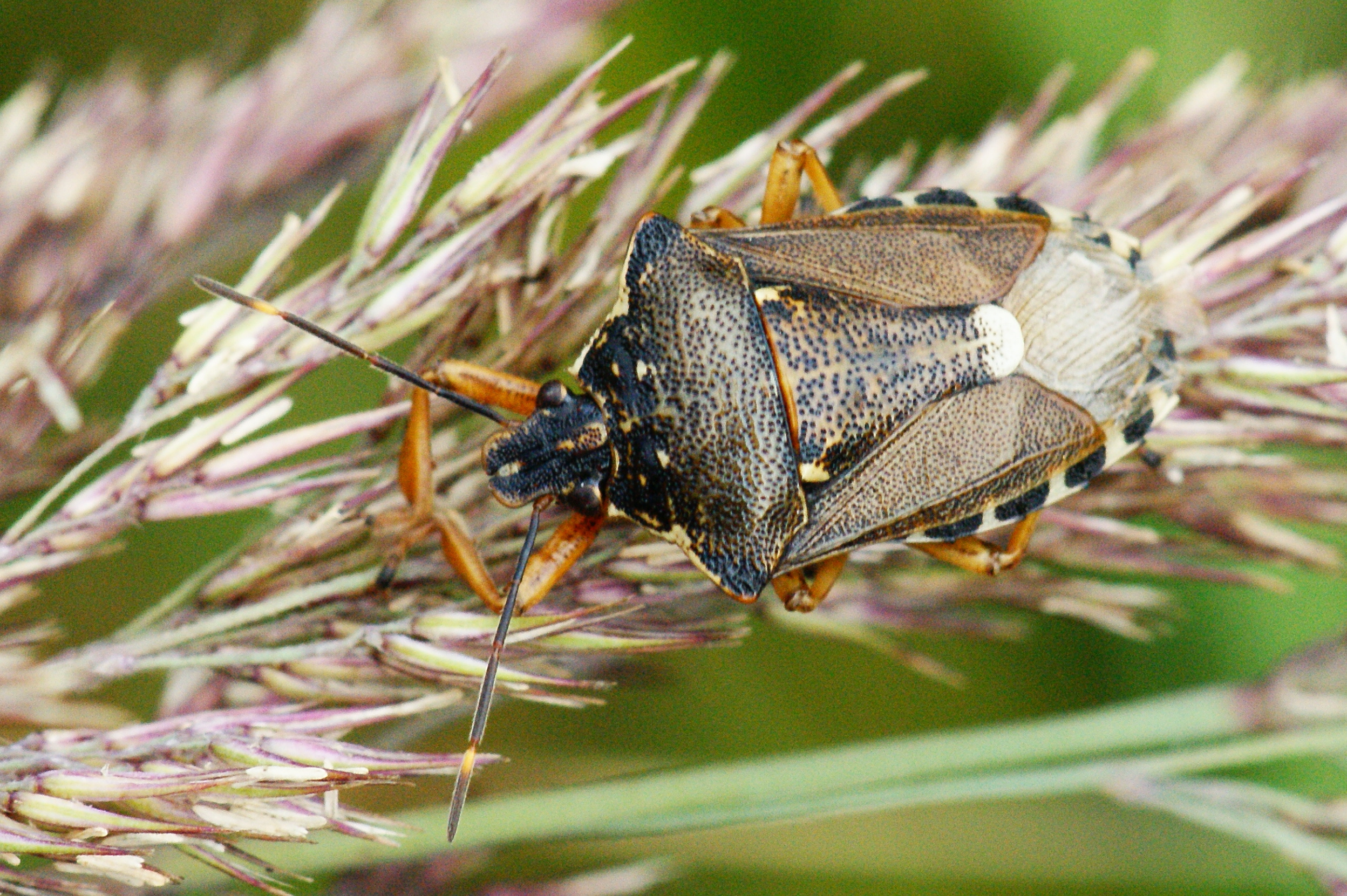 Pinthaeus sanguinipes